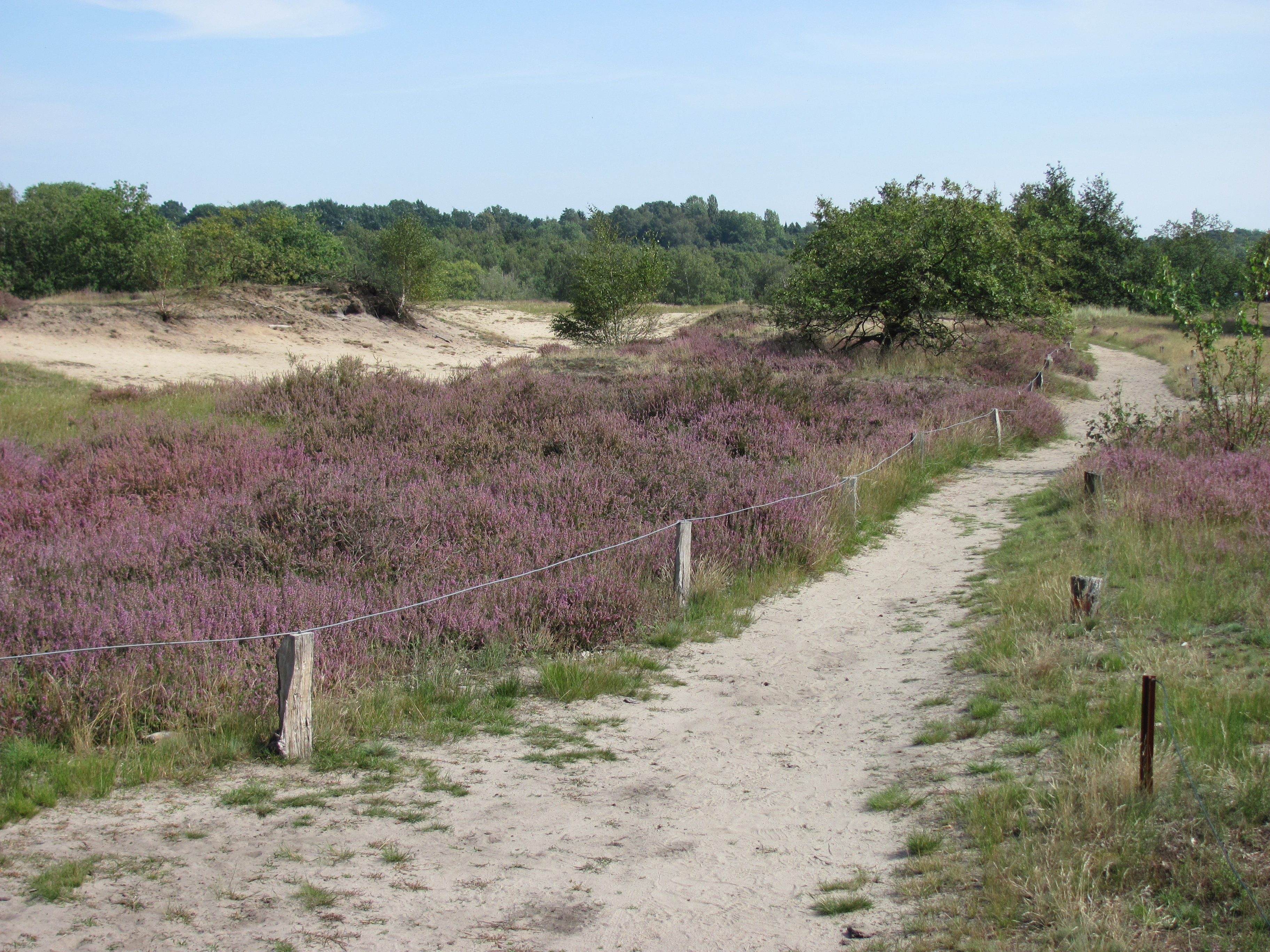 Boberger Dünen